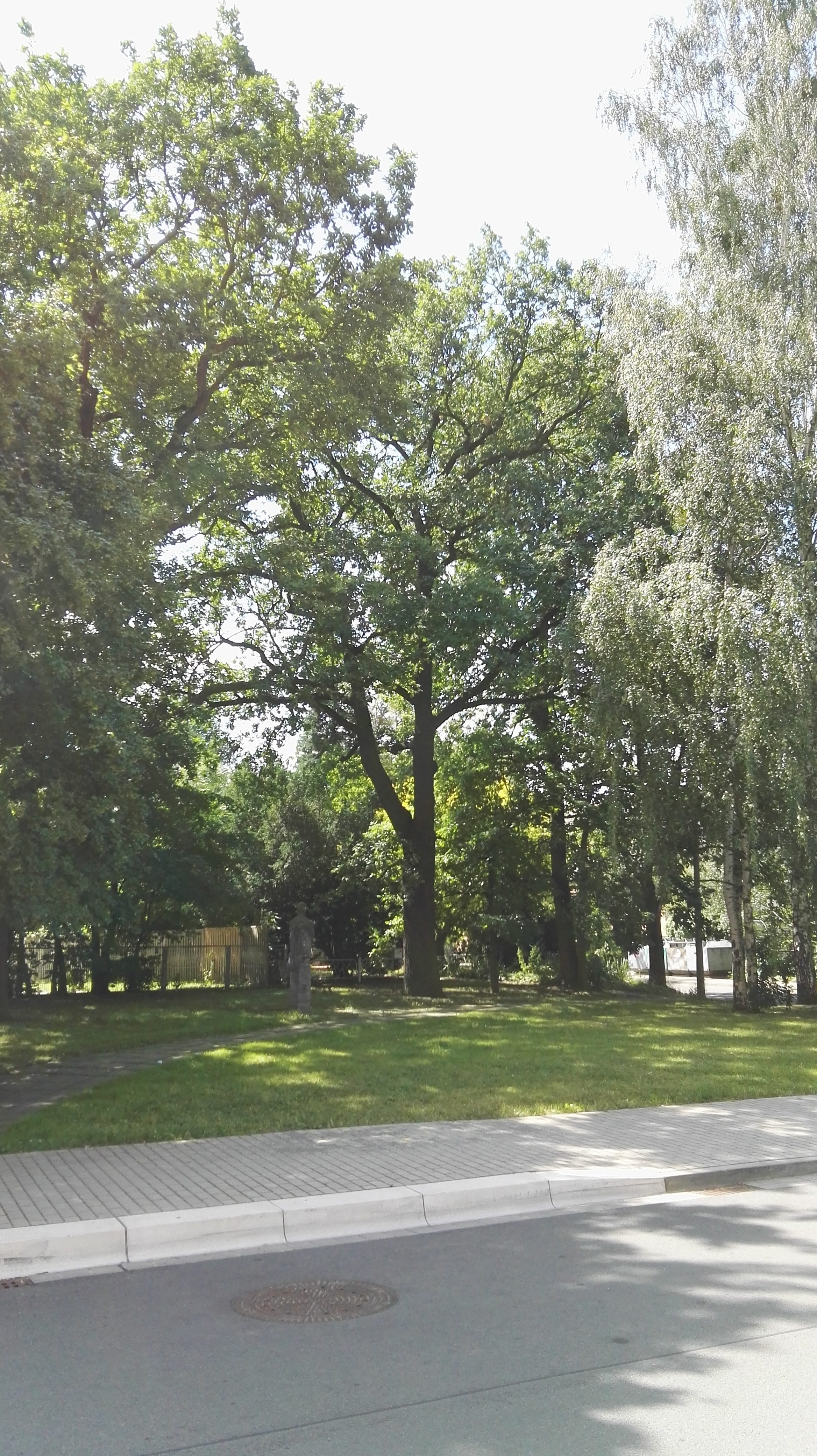 Naturdenkmal in Senftenberg Nr. 0100-9; Stieleiche (Quercus robur) nordwestlich außerhalb des Kindergartens Glück-Auf-Straße, westlicher Baum; Teil der Baumreihe aus Eichen 0100-5 bis 0100-9; davor die Plastik "Die Badende" von Ernst Sauer